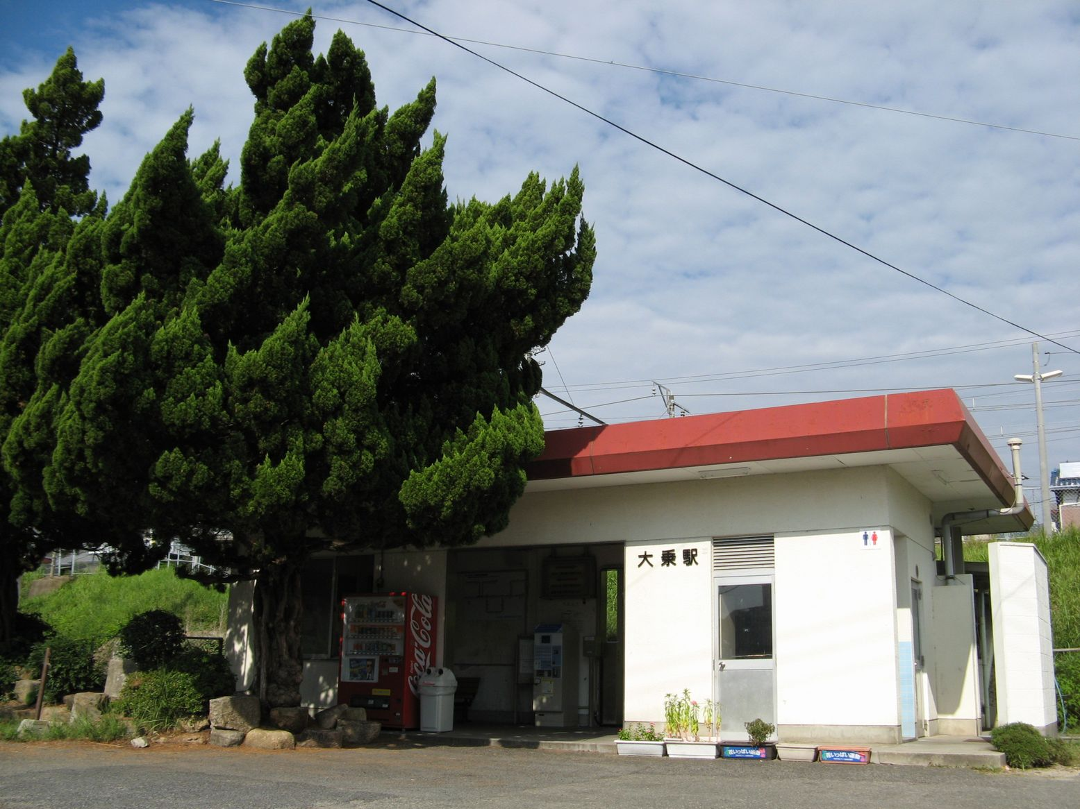 呉線 大乗駅